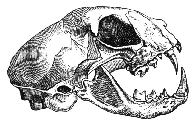 Original caption: "Fig. 75. Schädel der Wildkatze, Felis catus; in halber natürlicher Größe" Translation (partly): "Skull of Felis silvestris, 1/2 of natural size" Size: 2.2 x 1.4 in² (5.5 x 3.5 cm²)